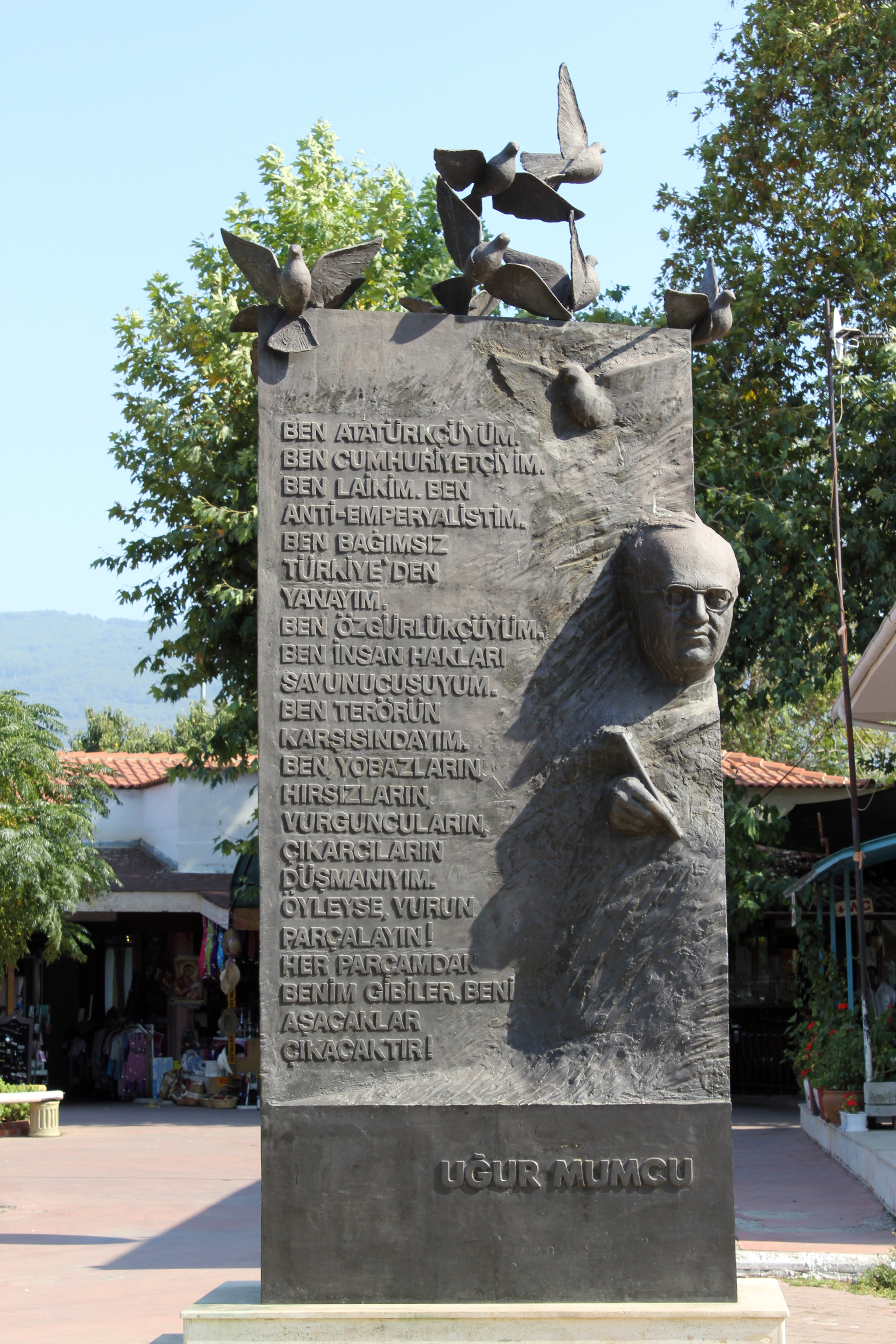 Denkmal für Uğur Mumcu in Selçuk in der Westtürkei